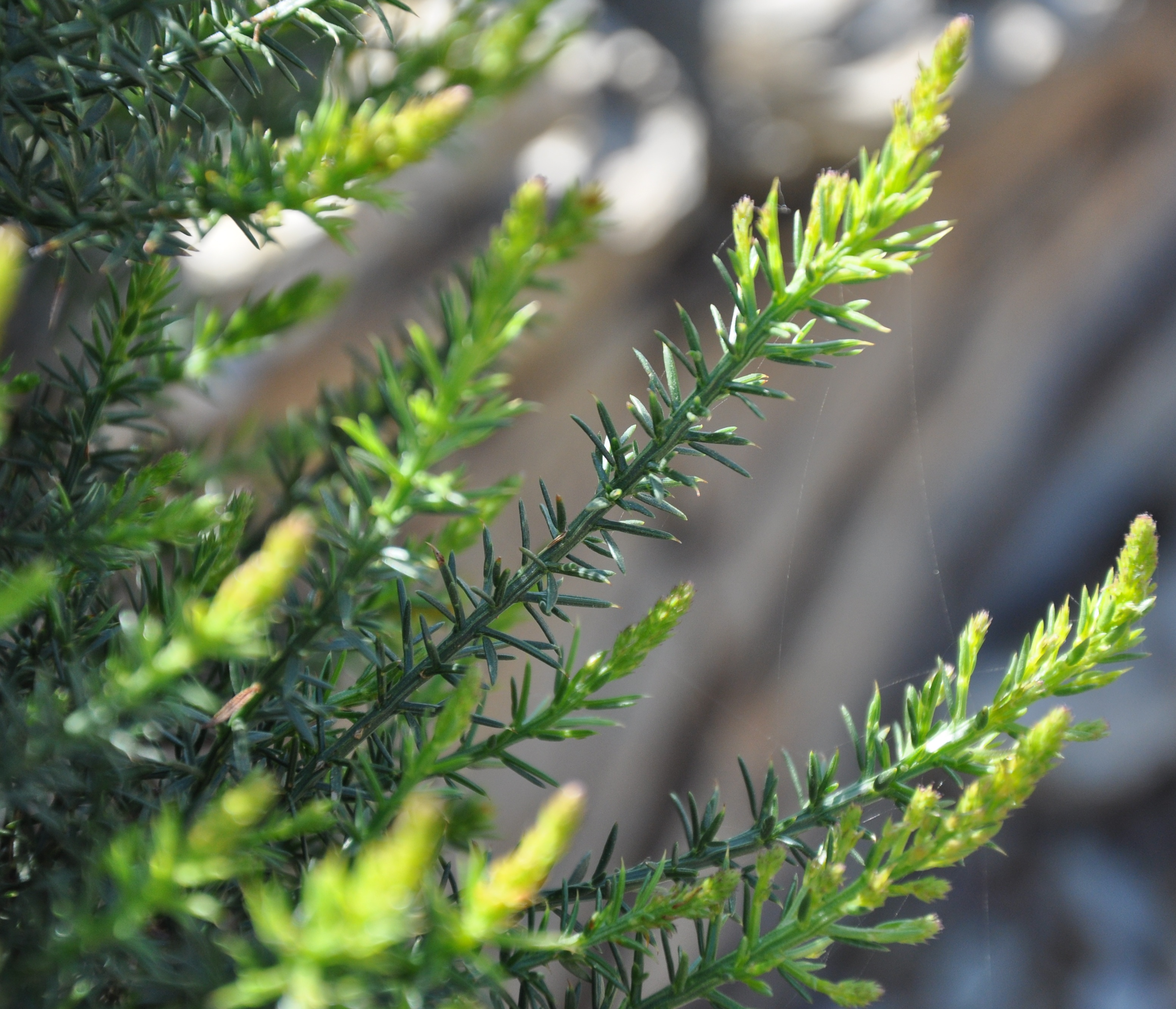 Aulaga (Genista tridens), Ceuta, España.